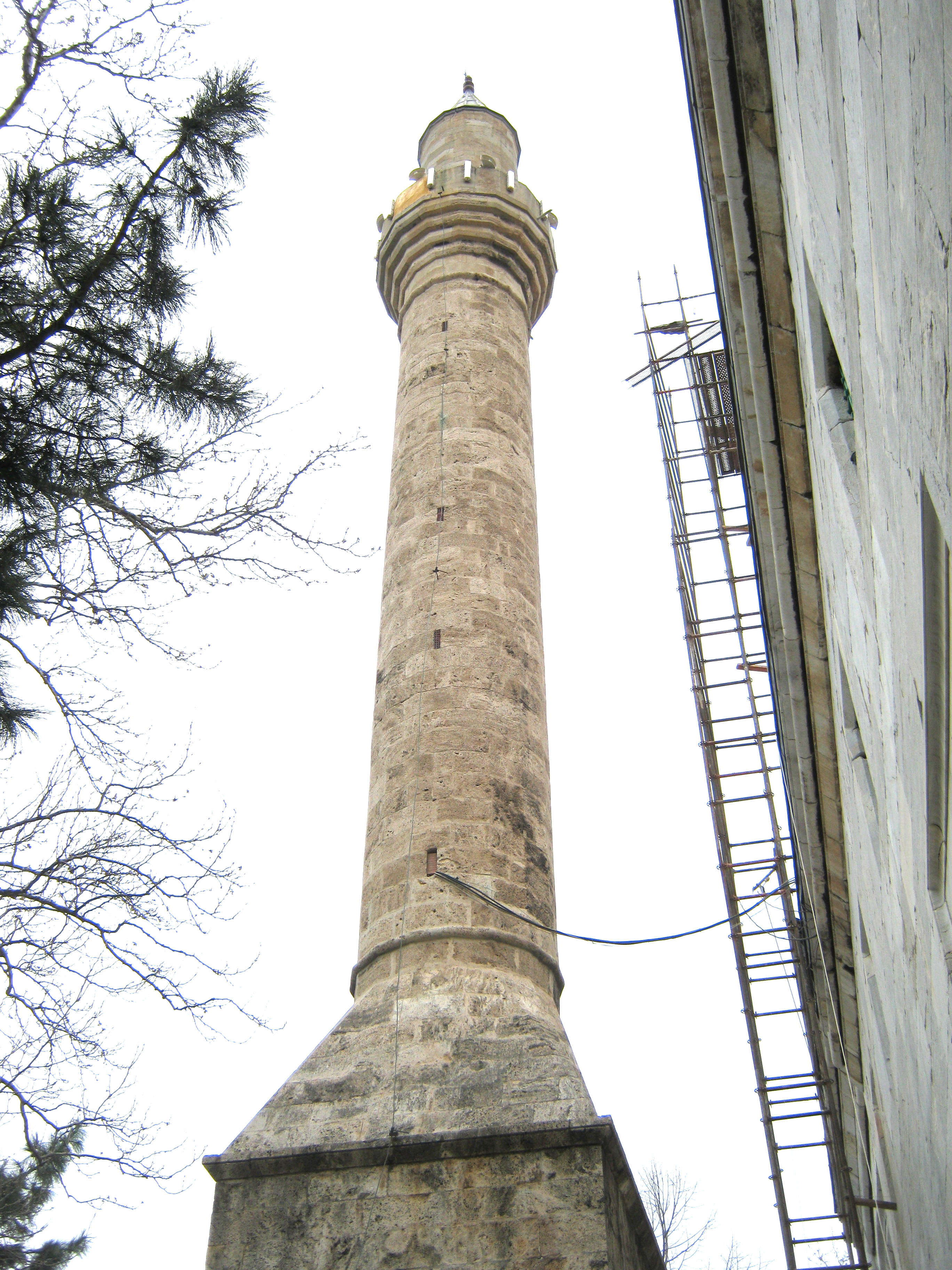 YILDIRIM,BEYAZIT,CAMİİ